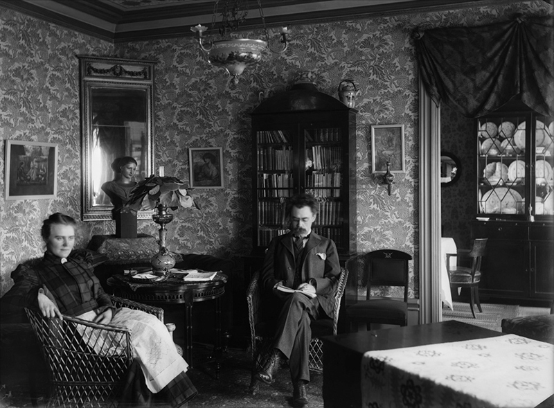 Erik Folcker med frun Gerda i sitt hem. Katarina Högbergsgata 12.